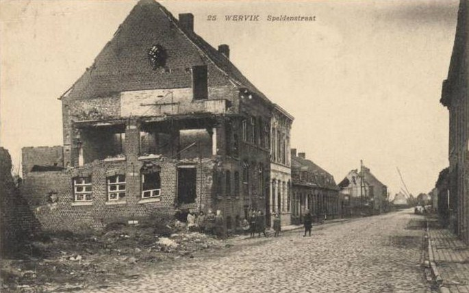 Ruines van brouwerij Franchomme in de Speldenstraat Wervik, na bombardementen tijdens WO I